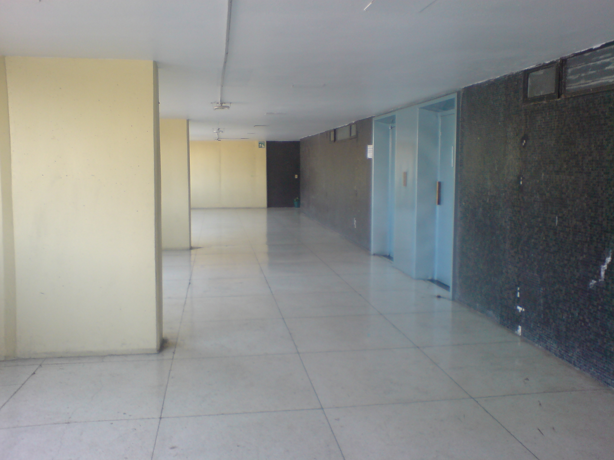 pasillo de edificio Chihuahua